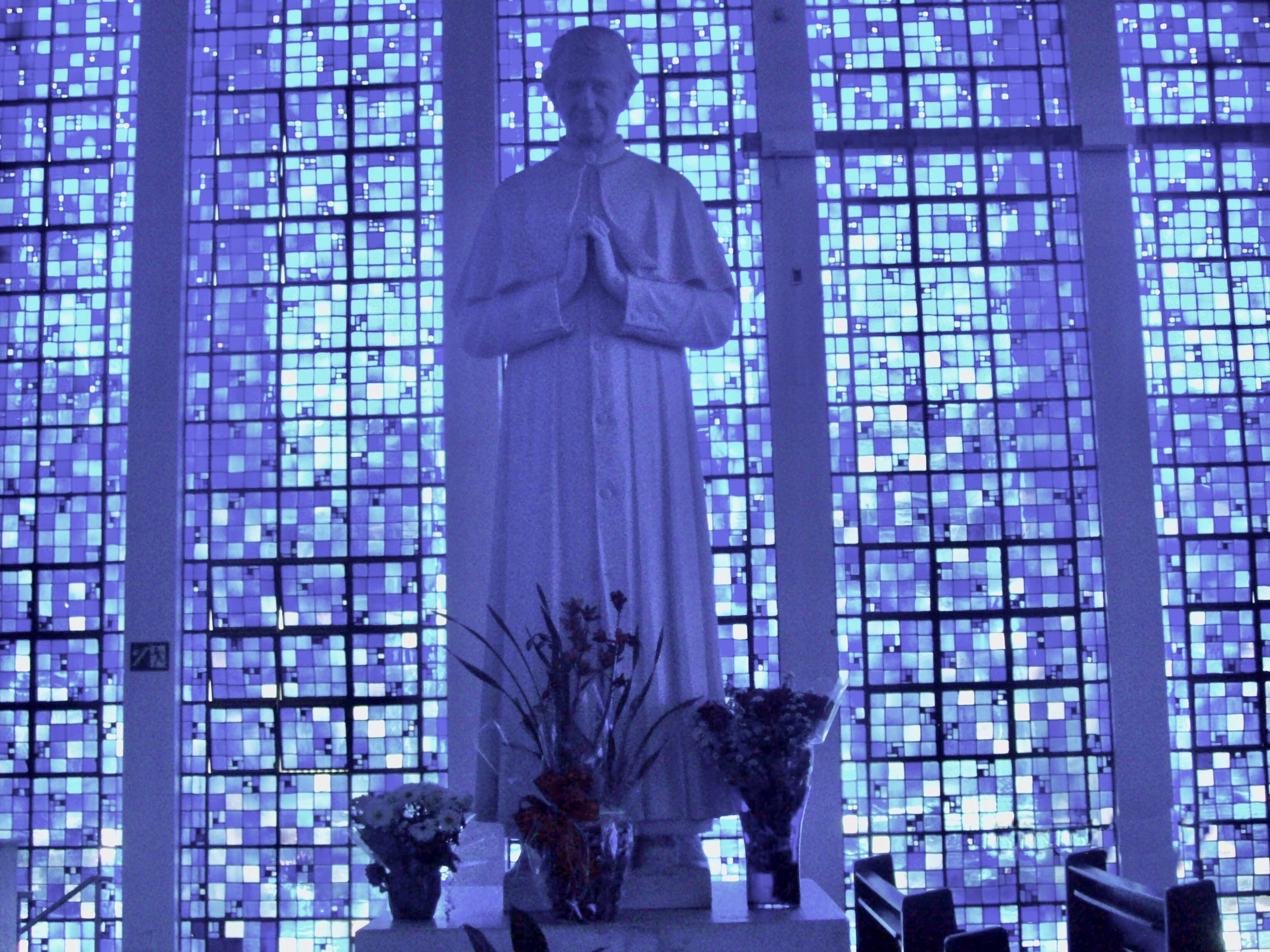 Brasilia DF Brasil - Santuário Dom Bosco, estatua de Dom Bosco, em mármore